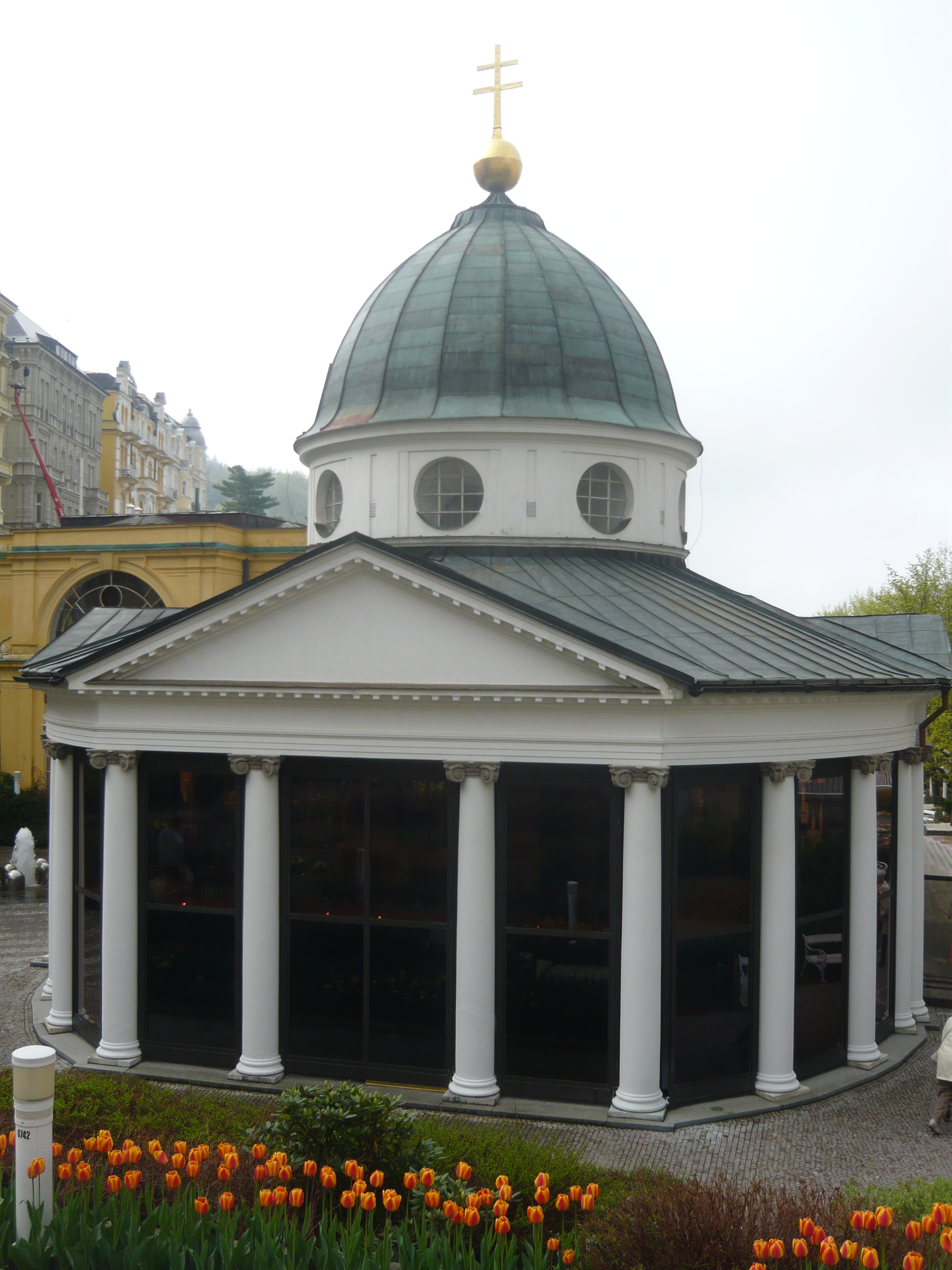 Křížový pramen, Mariánské Lázně